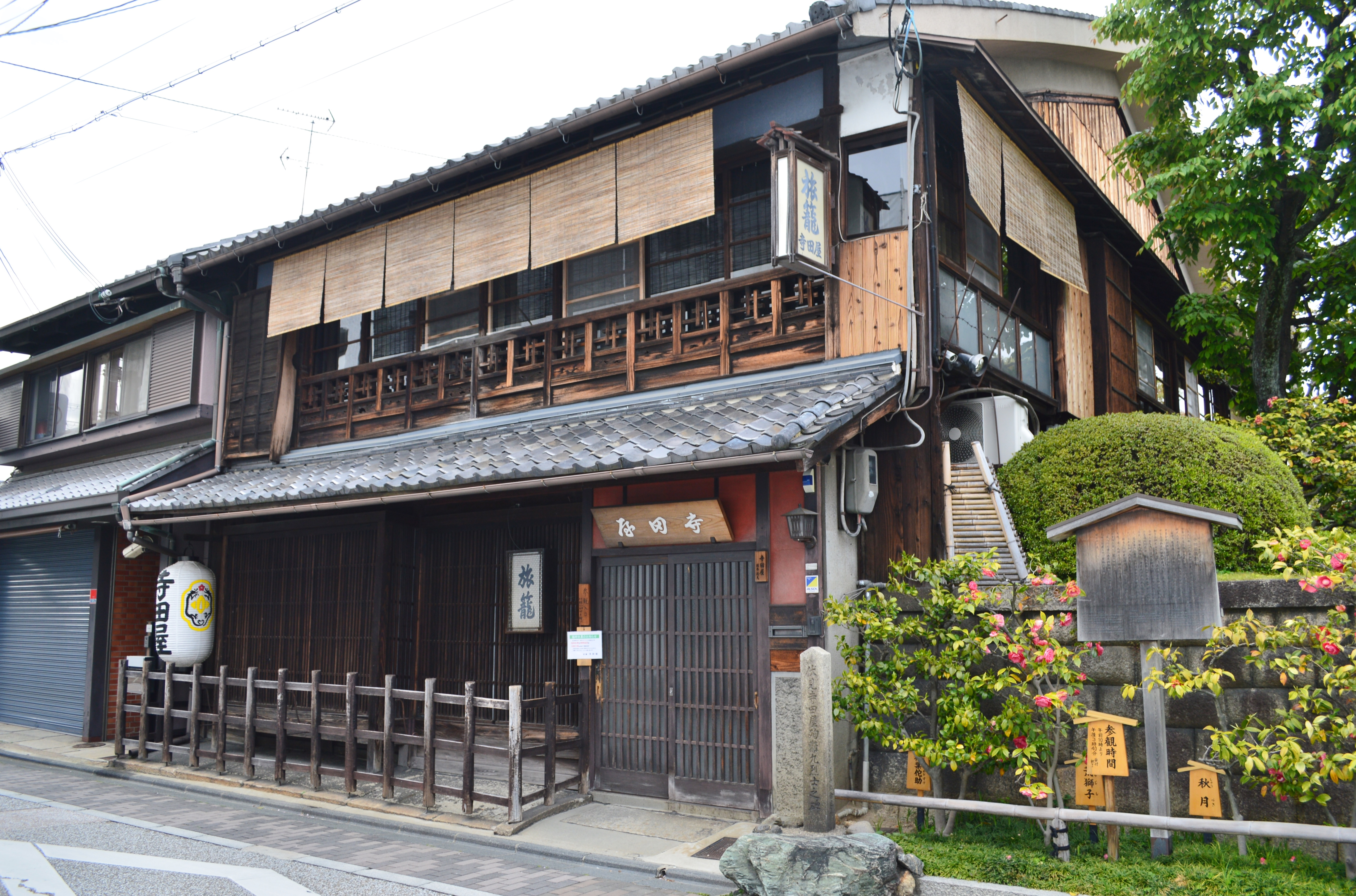 寺田屋 概観